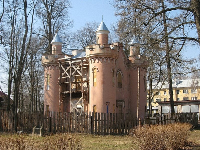 Станькава. Скарбчык